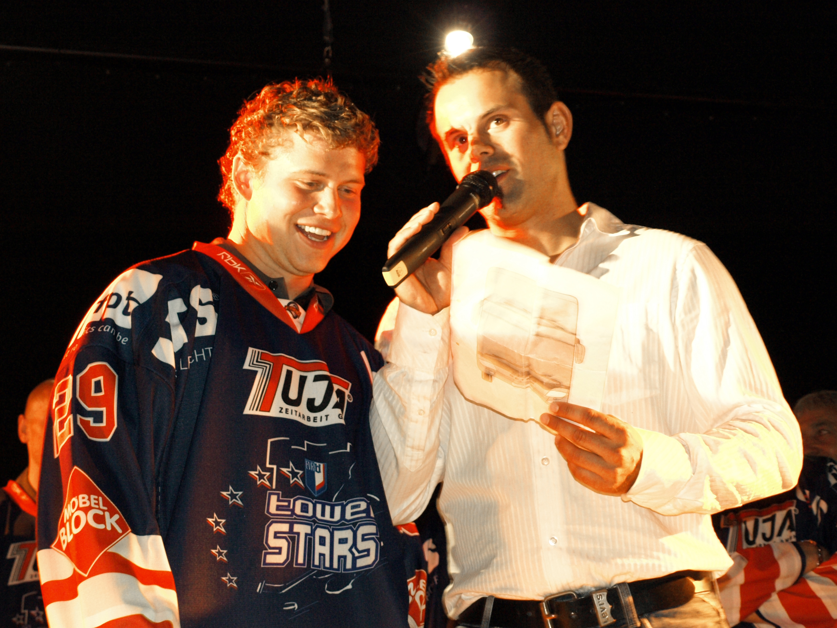 Ben Thomson neben dem Stadionsprecher der Tower Stars, bei der Saisoneröffnungsparty